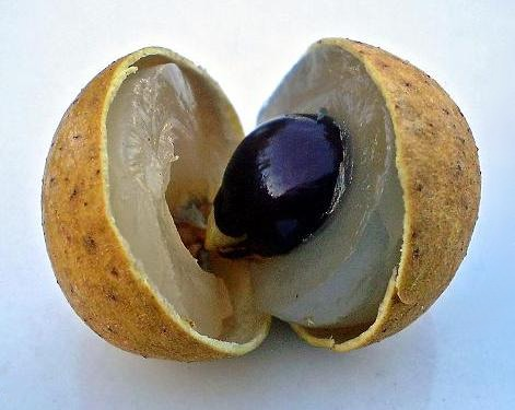 Fruta LONGAN (Dimocarpus longan Lour)